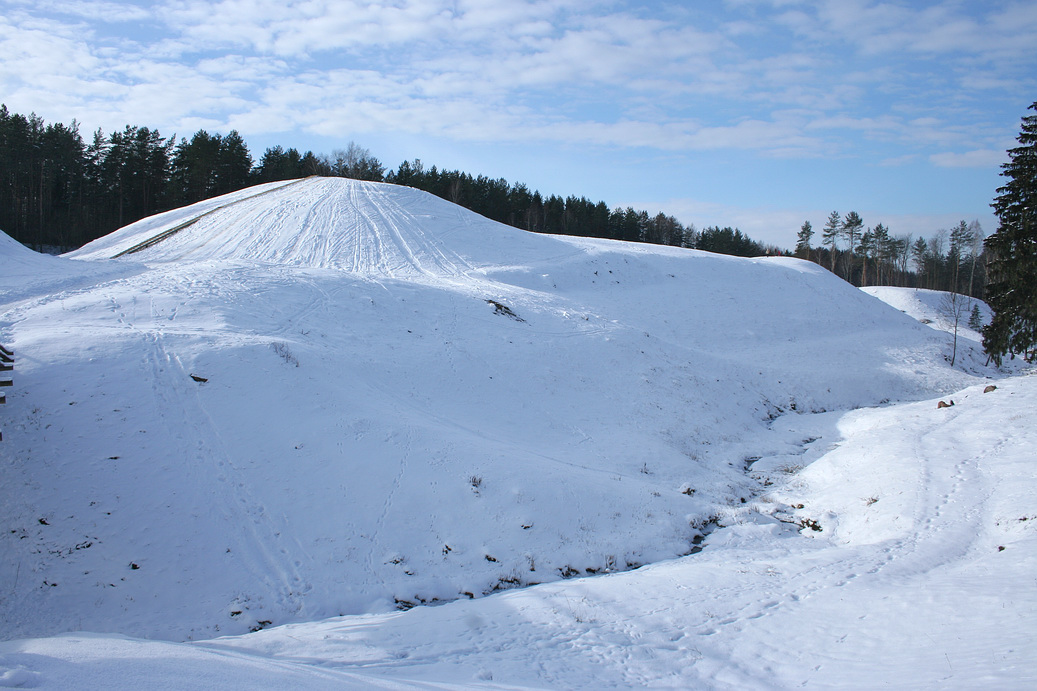 Seimyniškėliai hillfort near Anykščiai, Lithuania